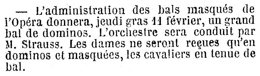 Annonce du bal masqué de l'Opéra donné le jeudi gras 11 février 1858. Extrait de la rubrique Bulletin des Théâtres, Journal des débats, 9 février 1858, page 3, 4ème colonne.